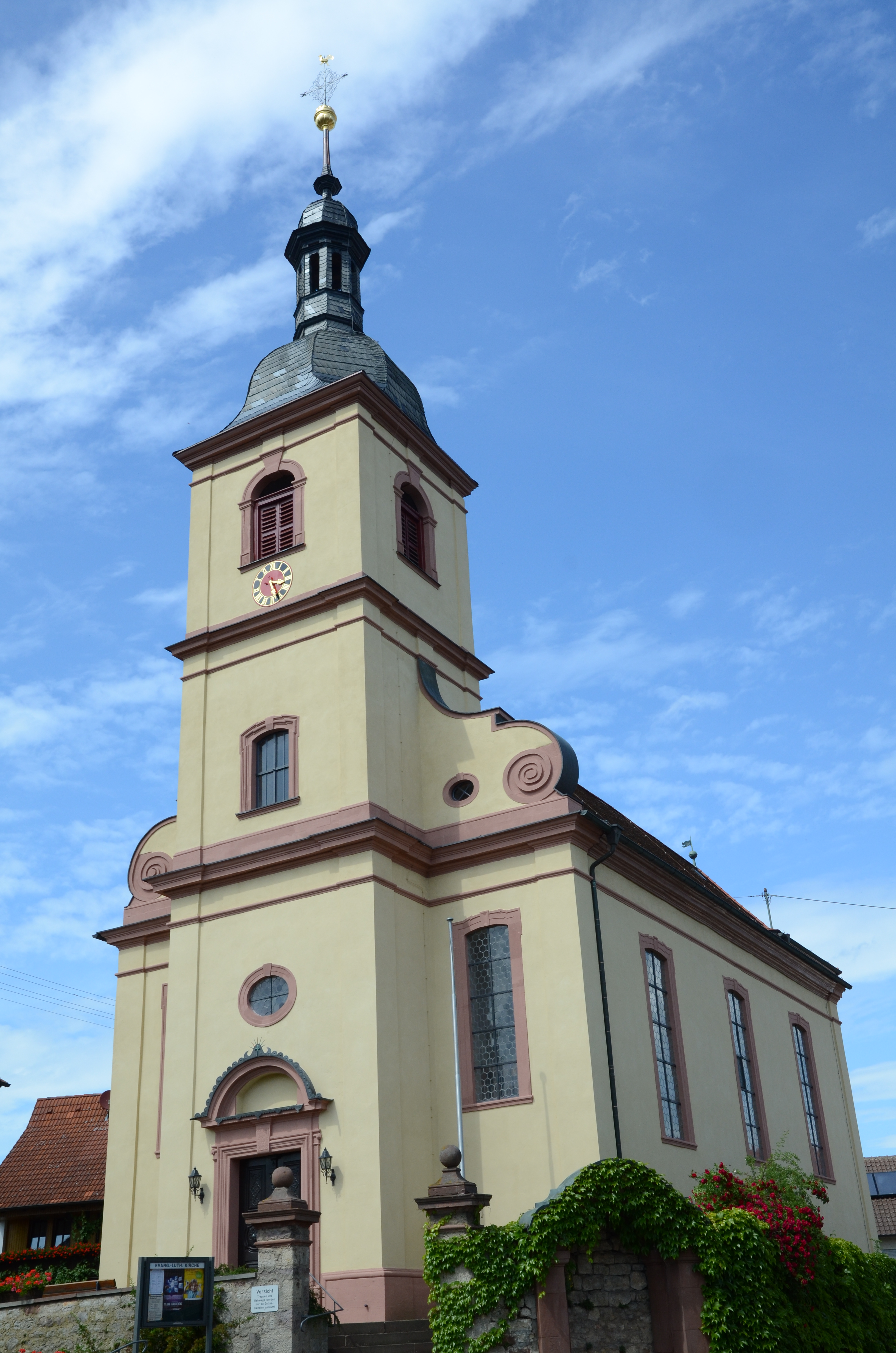 evang.-luth. Kirche in Heßdorf